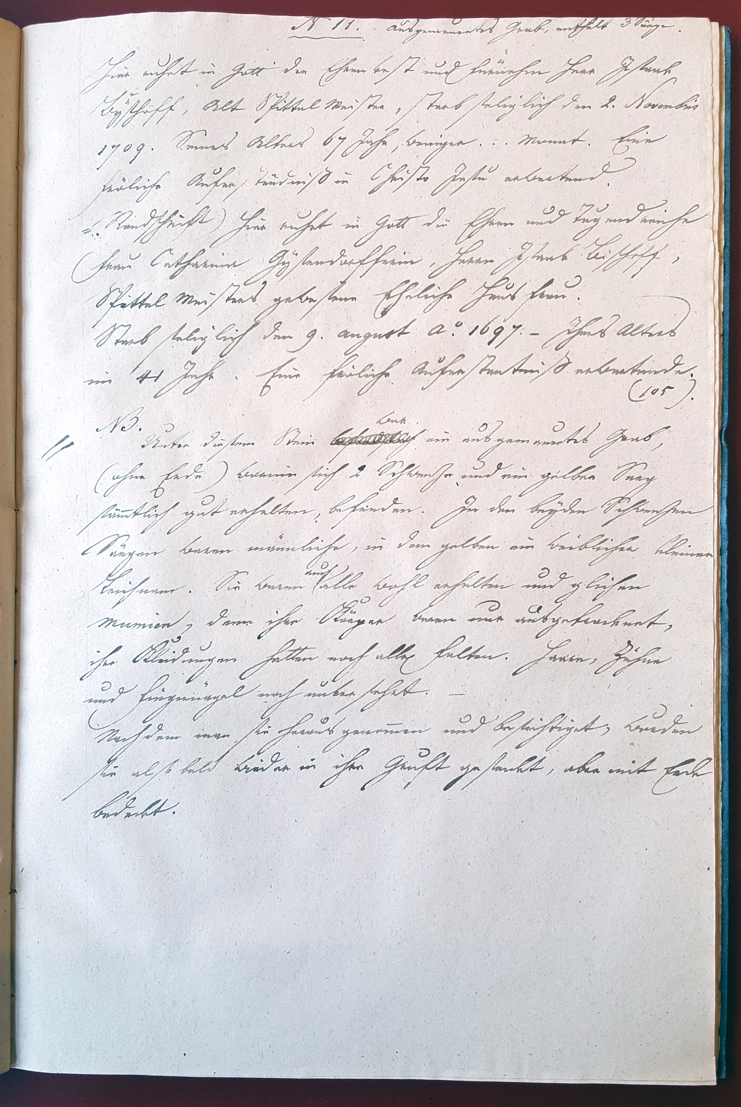 Aktennotiz des Bauleiters Blendinger nach dem Fund der Mumie von Anna Catharina Bischoff